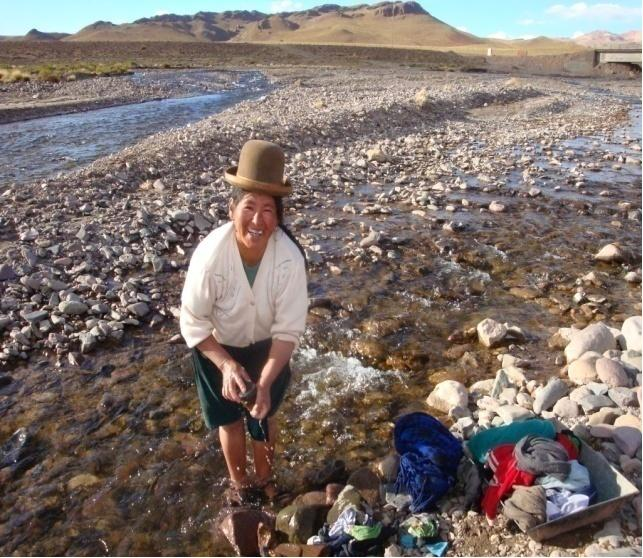 Habitante de San Pablo de Lípez, del municipio del mismo nombre, en la Provincia de Sud Lípez en el departamento de Potosí, a unos 4.291 msnm, lava la ropa en el río próximo a la comunidad.